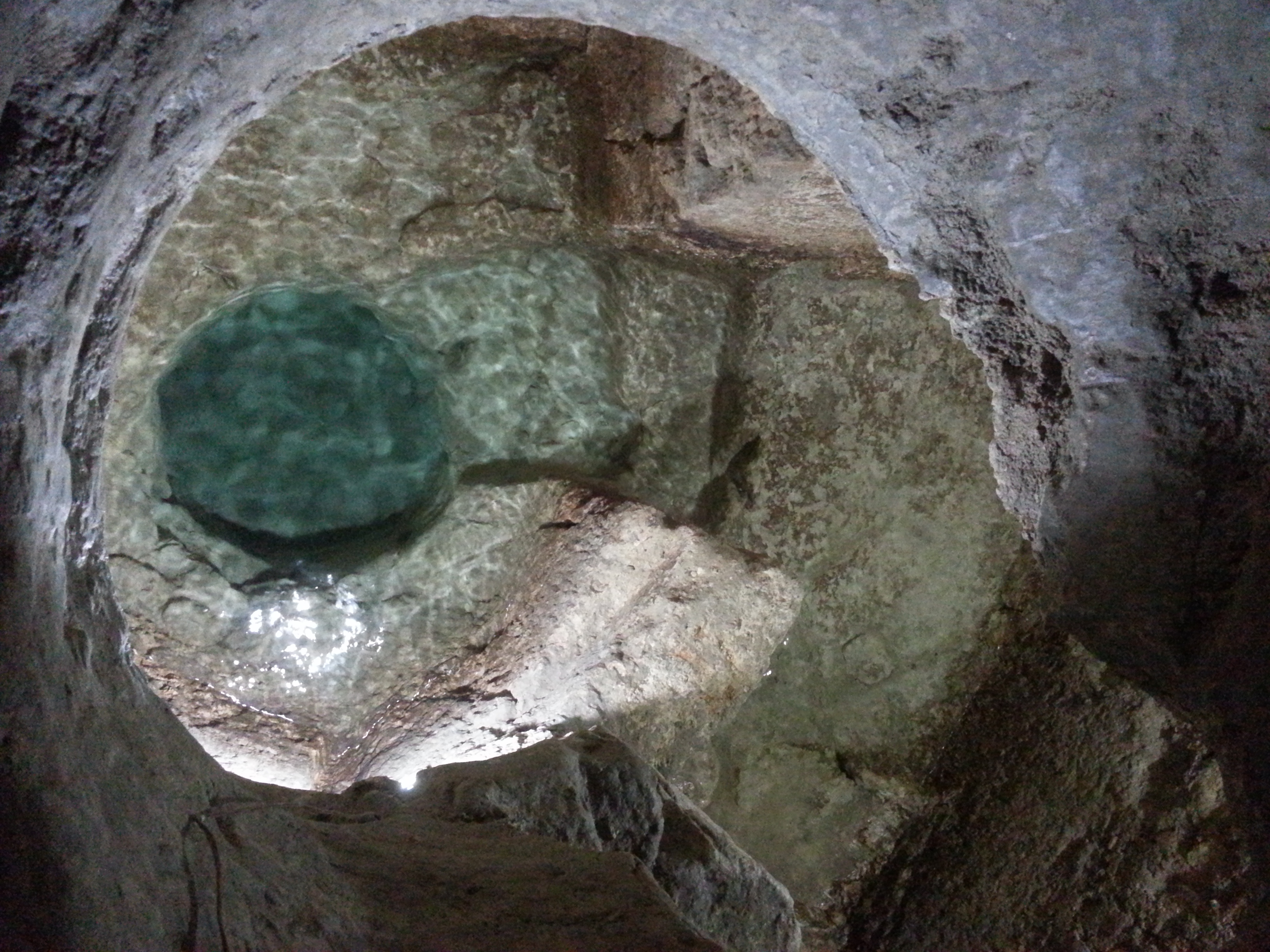 Il mikveh presente a diciotto metri di profondità sotto la chiesa di san Filippo Apostolo